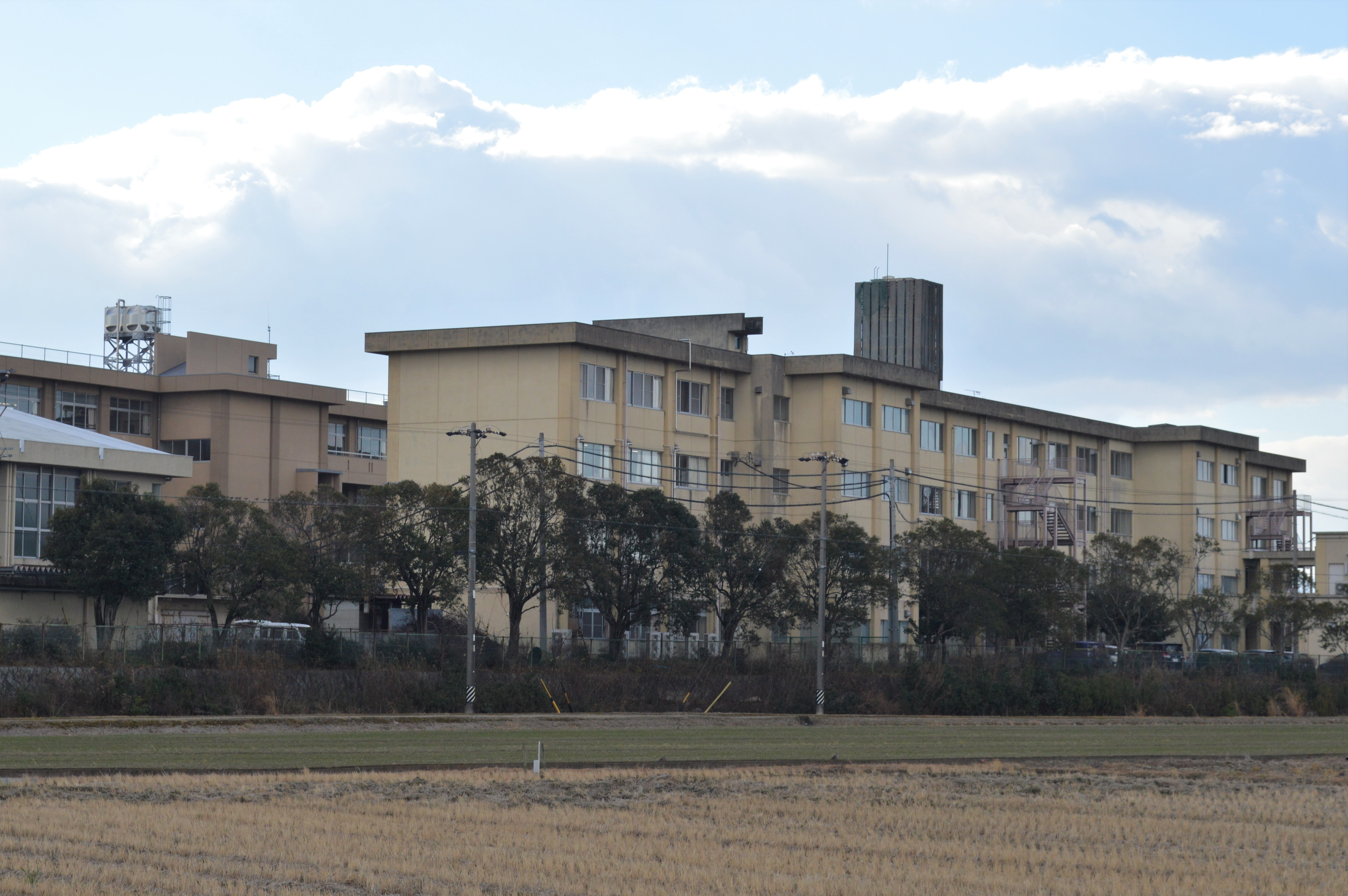 愛知県立海翔高等学校（愛知県立海翔高校）。愛知県弥富市。